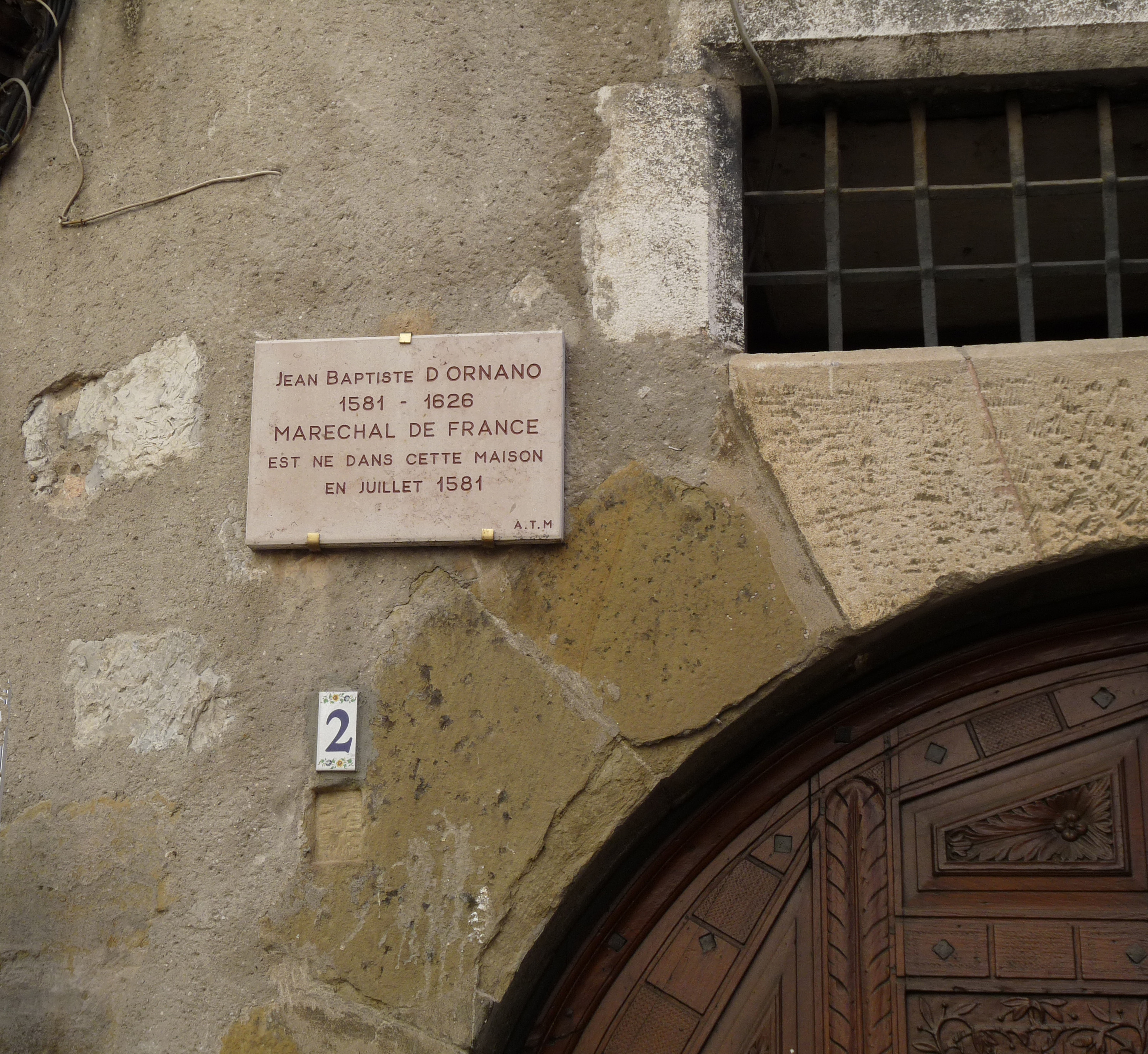 Plaque sur la maison natale de Jean Baptiste d'Ornano à Sisteron